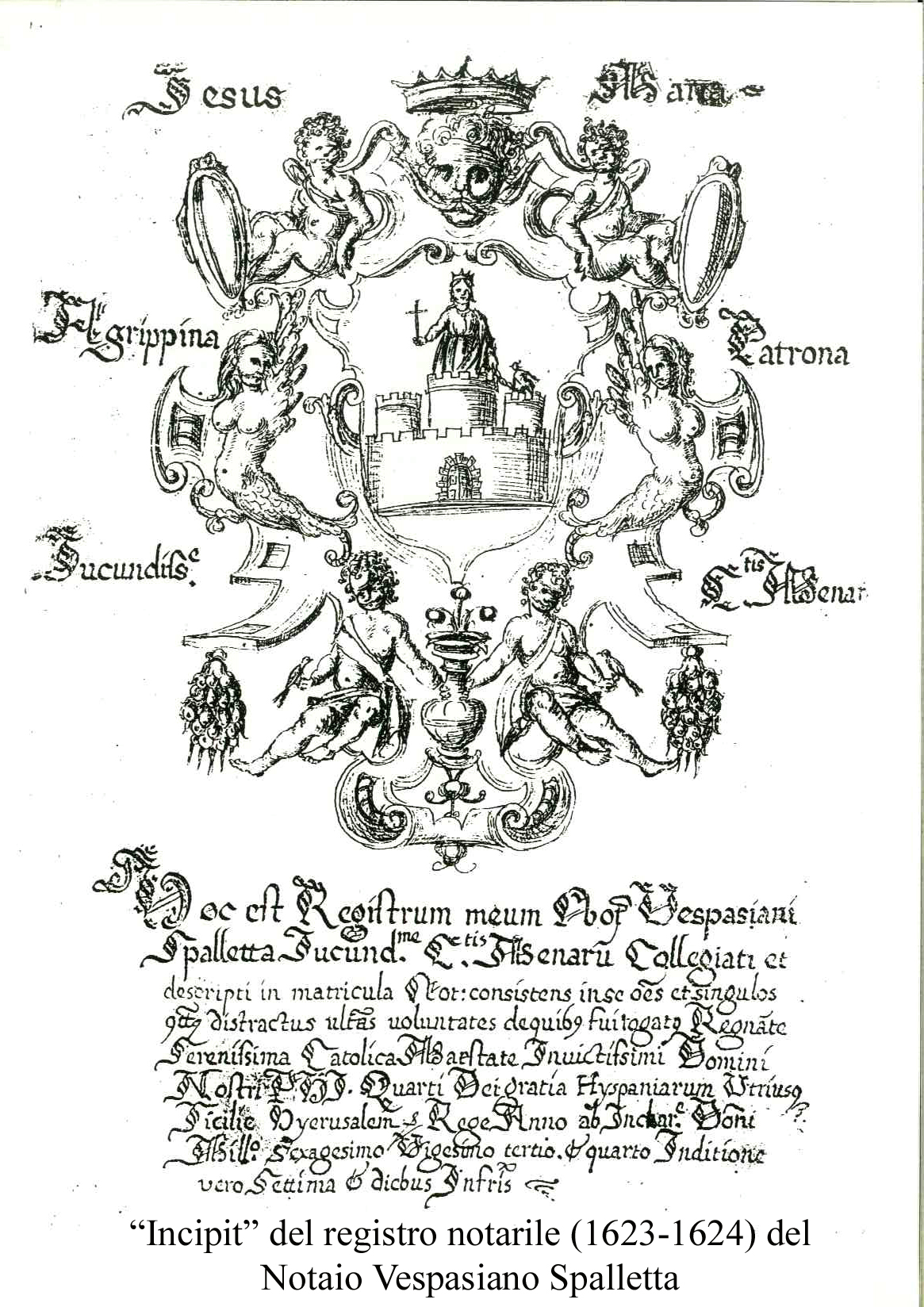 Incipit